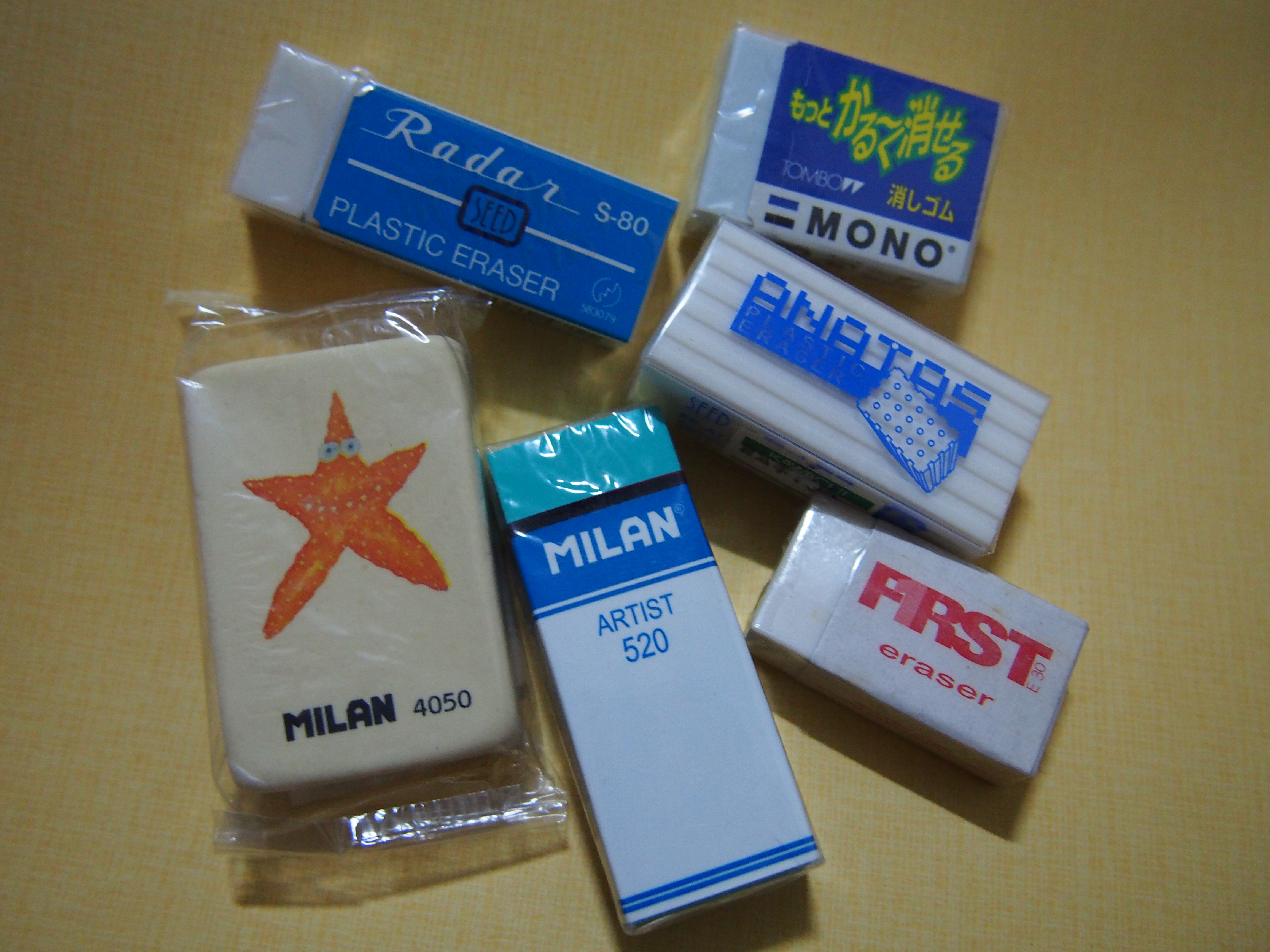 中文（台灣）: 各式各樣的橡皮擦